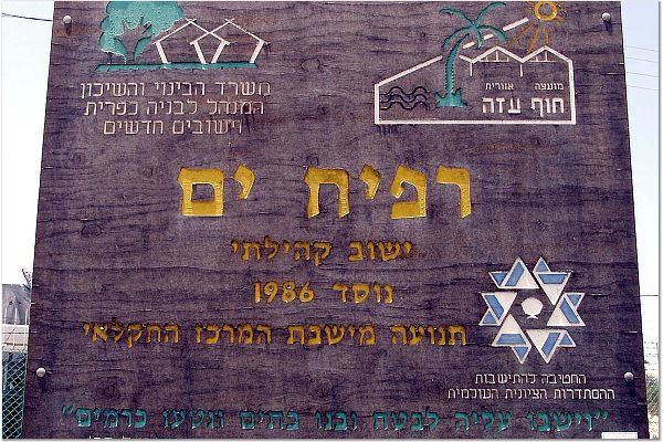 רפיח ים התמונות באדיבות קטיף.נט (קישור) אתר האינטרנט של גוש קטיף. צילם: מוטי סנדר.